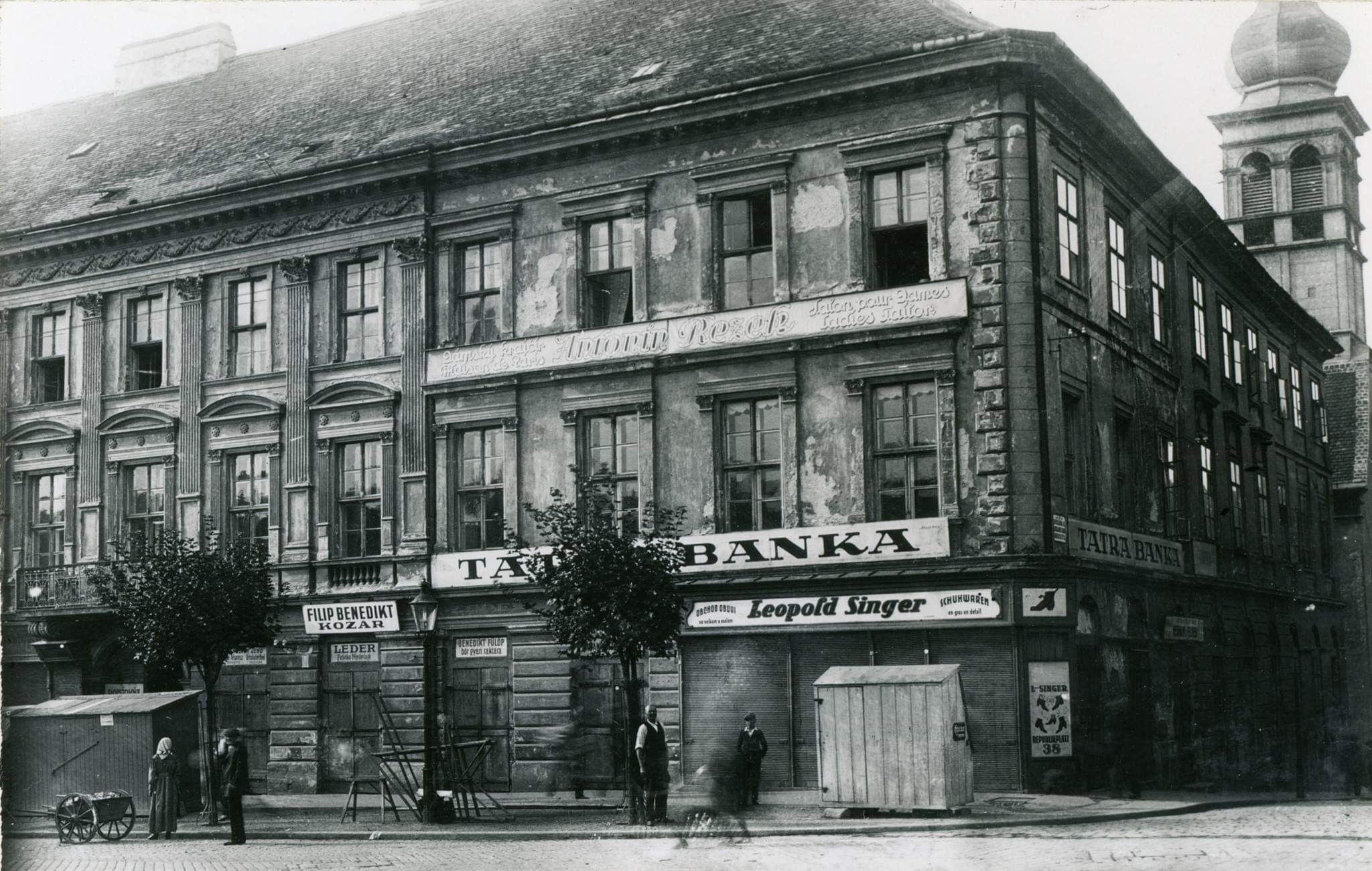 Schmidts Geburtshaus stand in Preßburg (heute Bratislava) an der Ecke Marktplatz (heute nám. SNP) / Ursulinengasse und wurde Ende der 1920ger Jahre abgerissen.